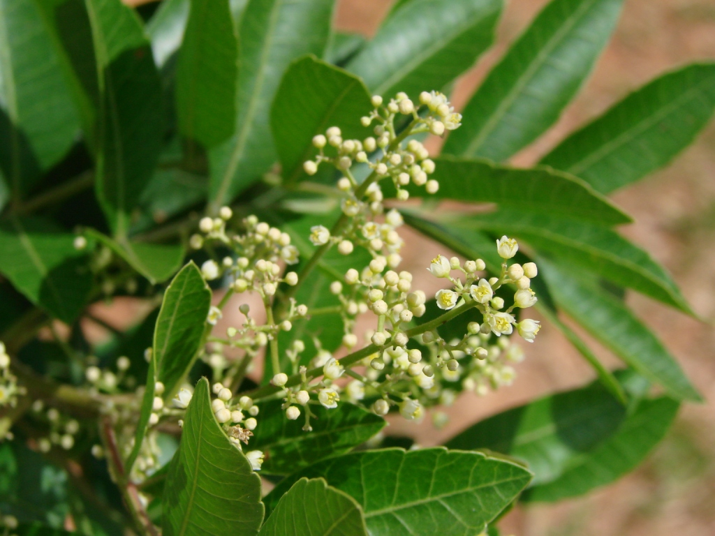 Schinus terebinthifolius - ANACARDIACEAE Parque Olhos D' Água - Brasília - Distrito Federal - Brasil.